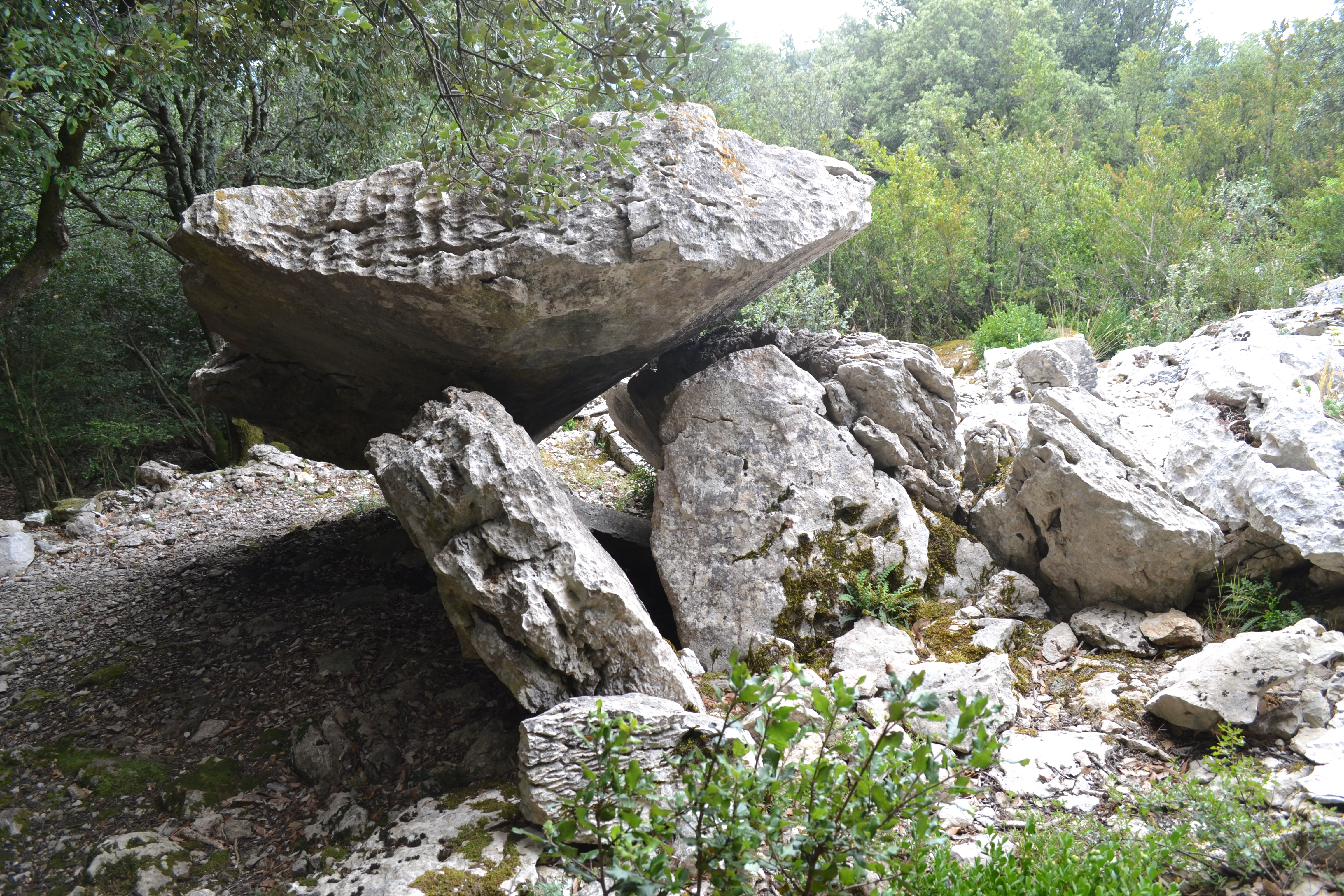 Dolmen n°1 de l'Arco del Pech (ou du Col de Guilhem) à Cubières-sur-Cinoble (11).